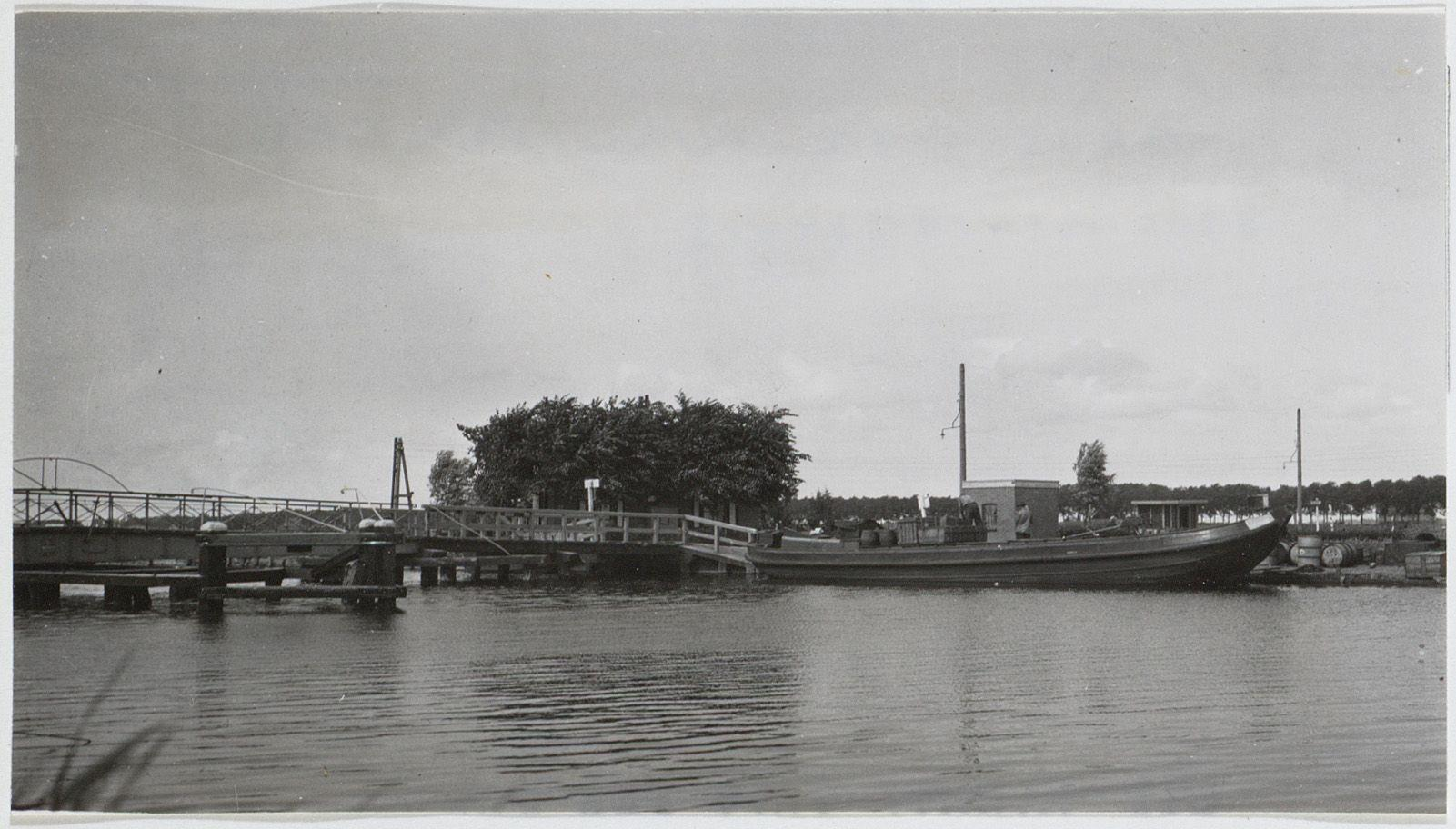 Beschrijving Badhoevedorp, gemeente Haarlemmermeer Ringvaart gezien vanaf Nieuwe Meerdijk in noordwestelijke richting Documenttype foto Vervaardiger Eck, J. van (Jacobus, 1873-1946) Collectie Collectie J. van Eck: foto's Datering juni 1922 Geografische naam Ringvaart Inventarissen Afbeeldingsbestand A01634001715 Generated with Dememorixer